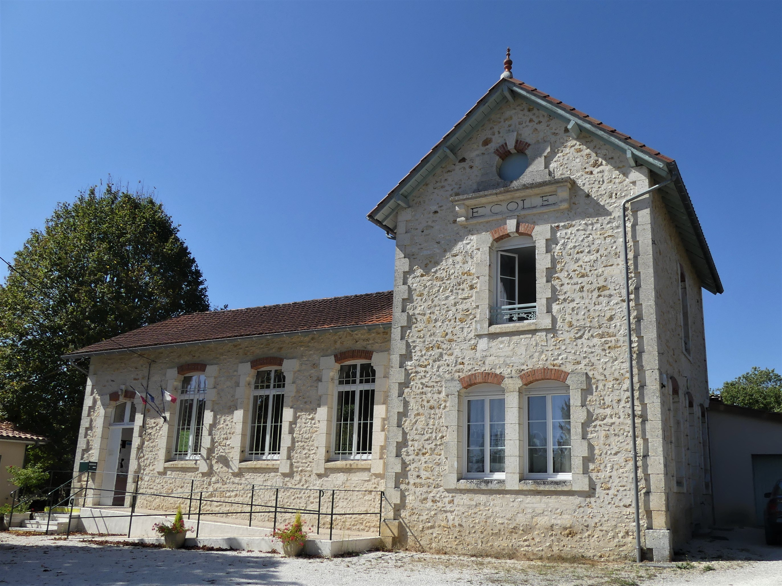 La mairie et l'ancienne école de Rudeau-Ladosse, Dordogne, France.